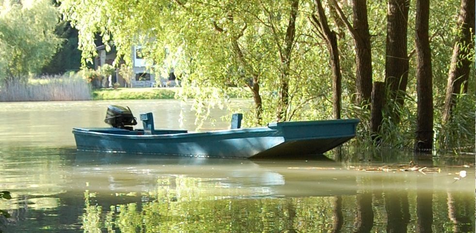 Quatrass nel Canale del fiume Mera